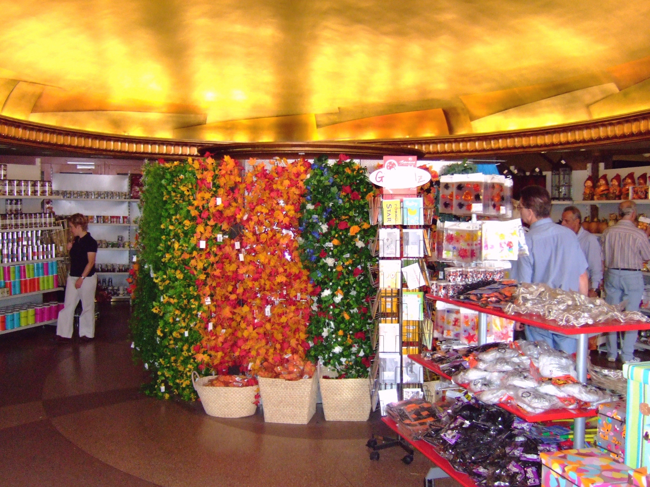 Metropol in Bonn - „zwischengenutztes“ Foyer